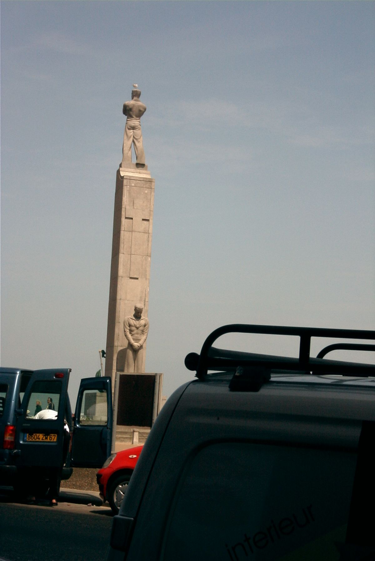 Szobor a tengerészeknek, Oostende, Belgium